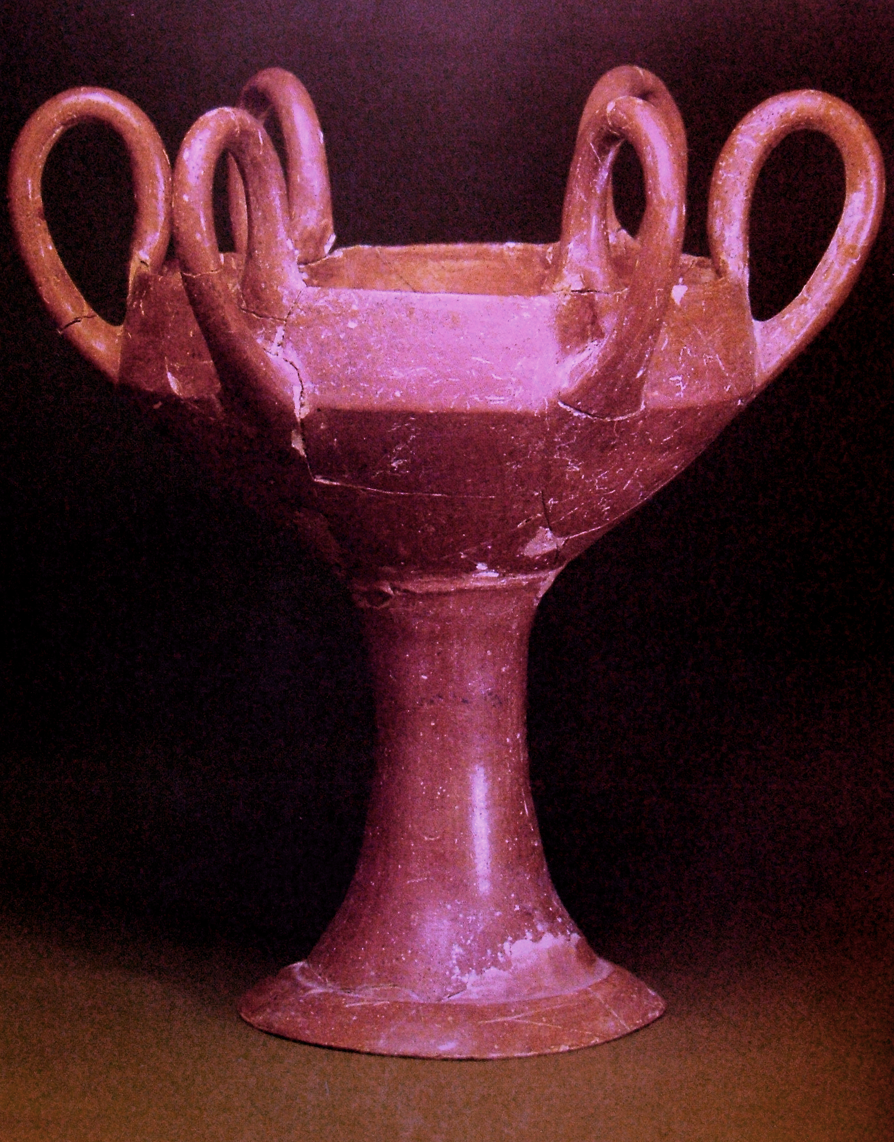 Bronzkori váza Kültepéből (Anatóliai Civilizációk Múzeuma, Ankara)